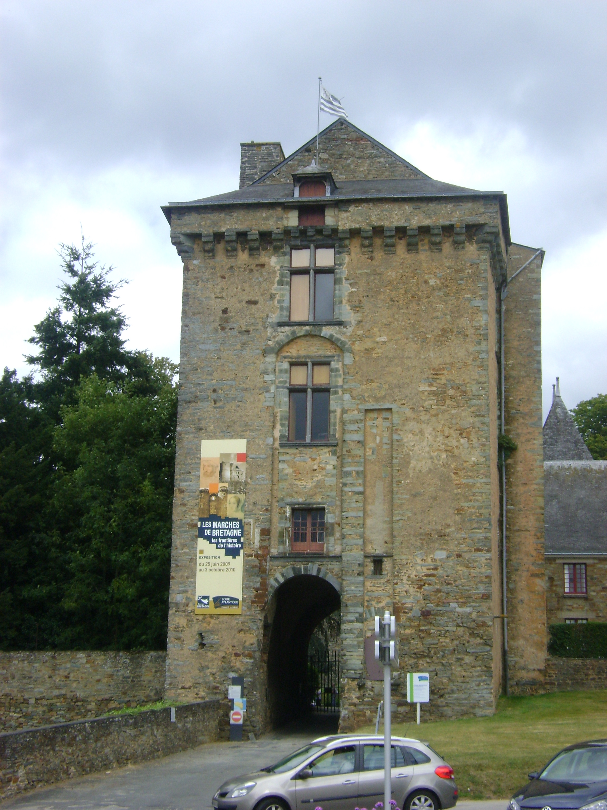 Le château de Châteaubriant. Loire-Atlantique. Le pavillon des champs. .